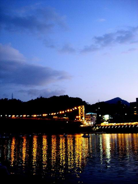 碧潭吊橋夜景。